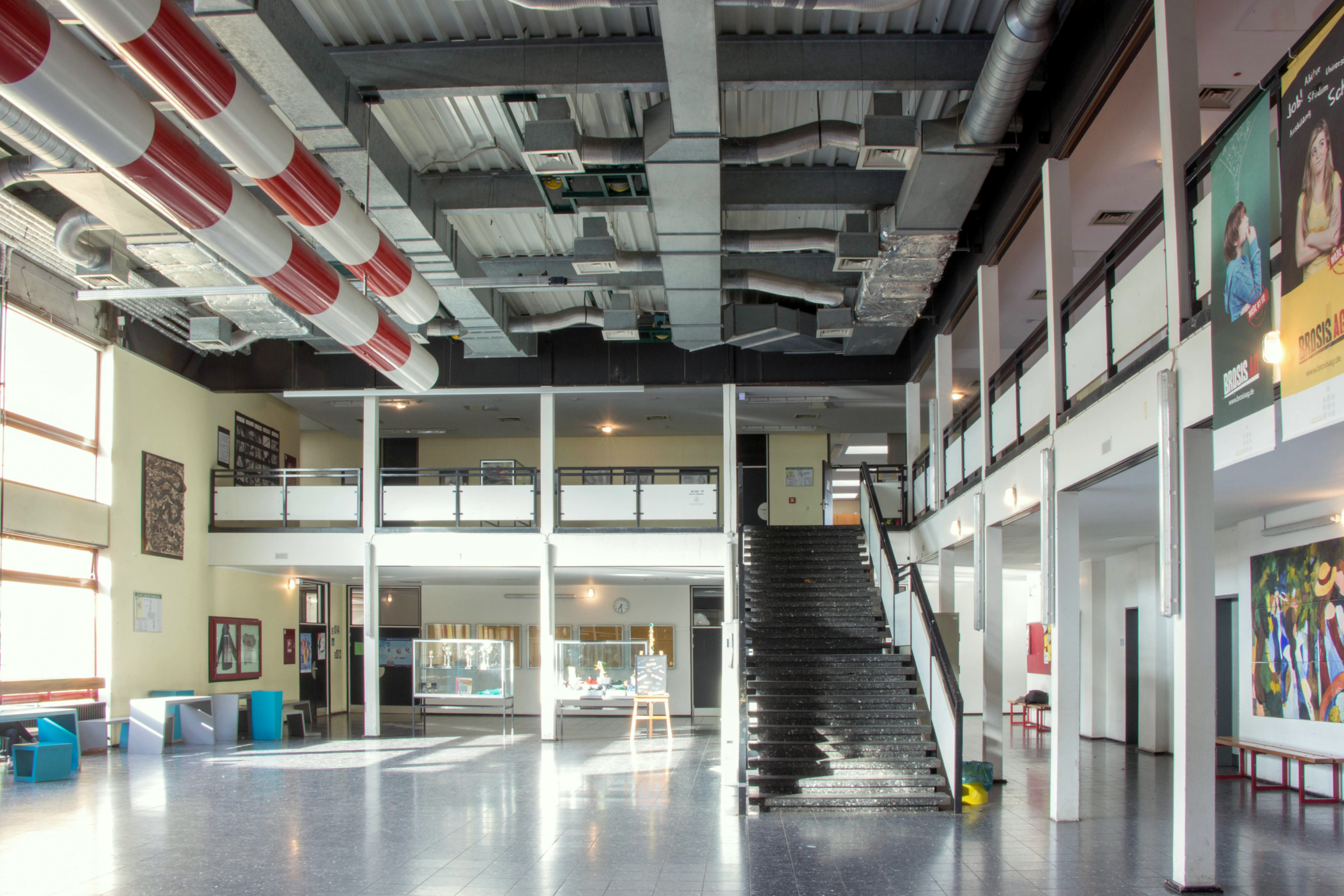 Pausenhalle des Heisenberg-Gymnasiums Gladbeck, November 2018.